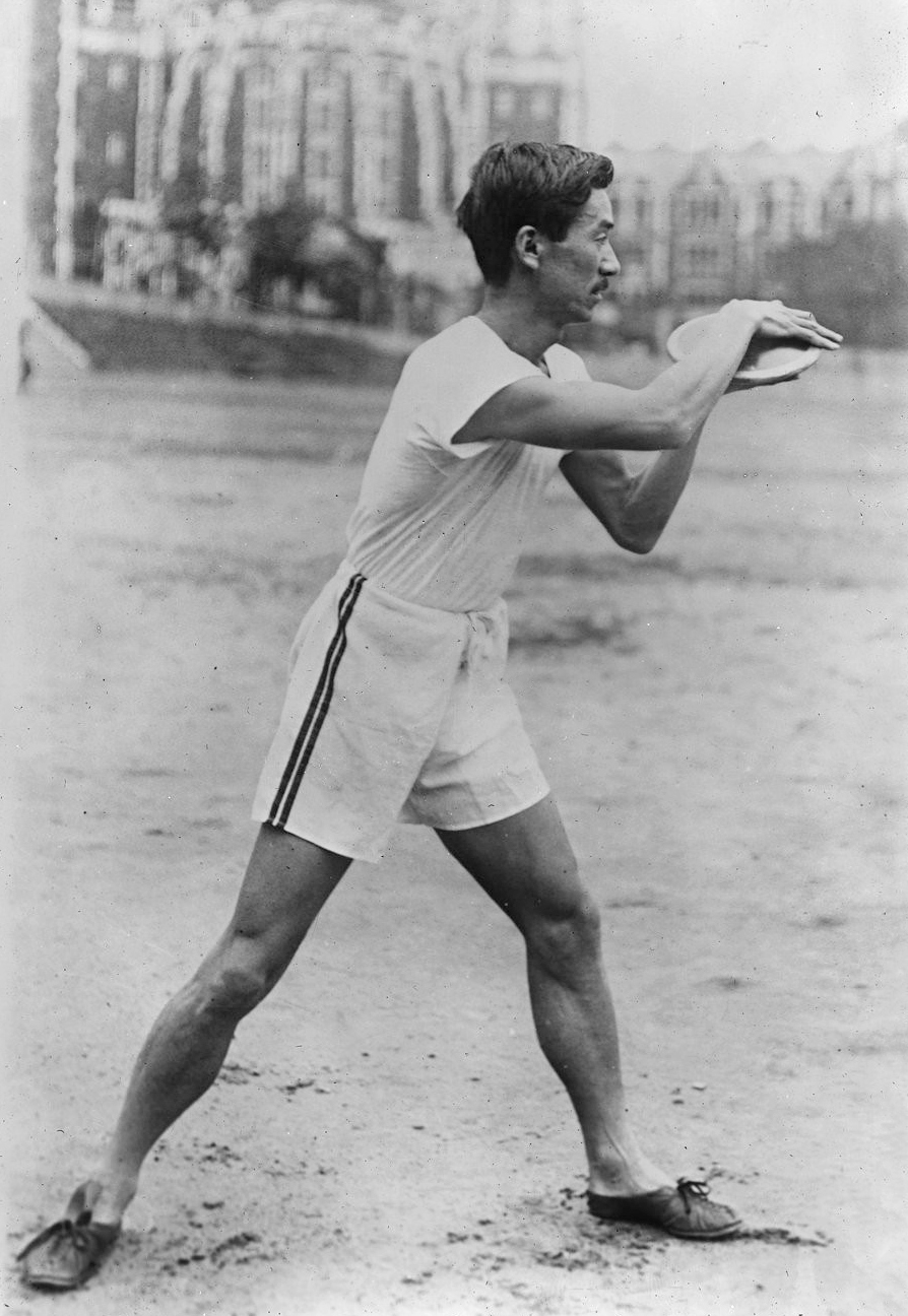 [Gensabulo] Noguchi [lanceur de disque] (japonais) : [photographie de presse] / [Agence Rol]